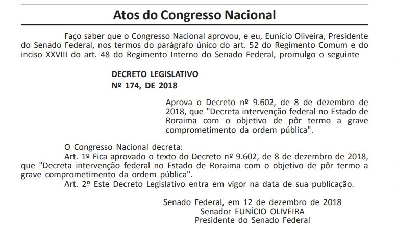 Decreto Legislativo do Congresso Nacional do Brasil aprovando o ato do Poder Executivo que faz a Intervenção federal em Roraima em 2018.